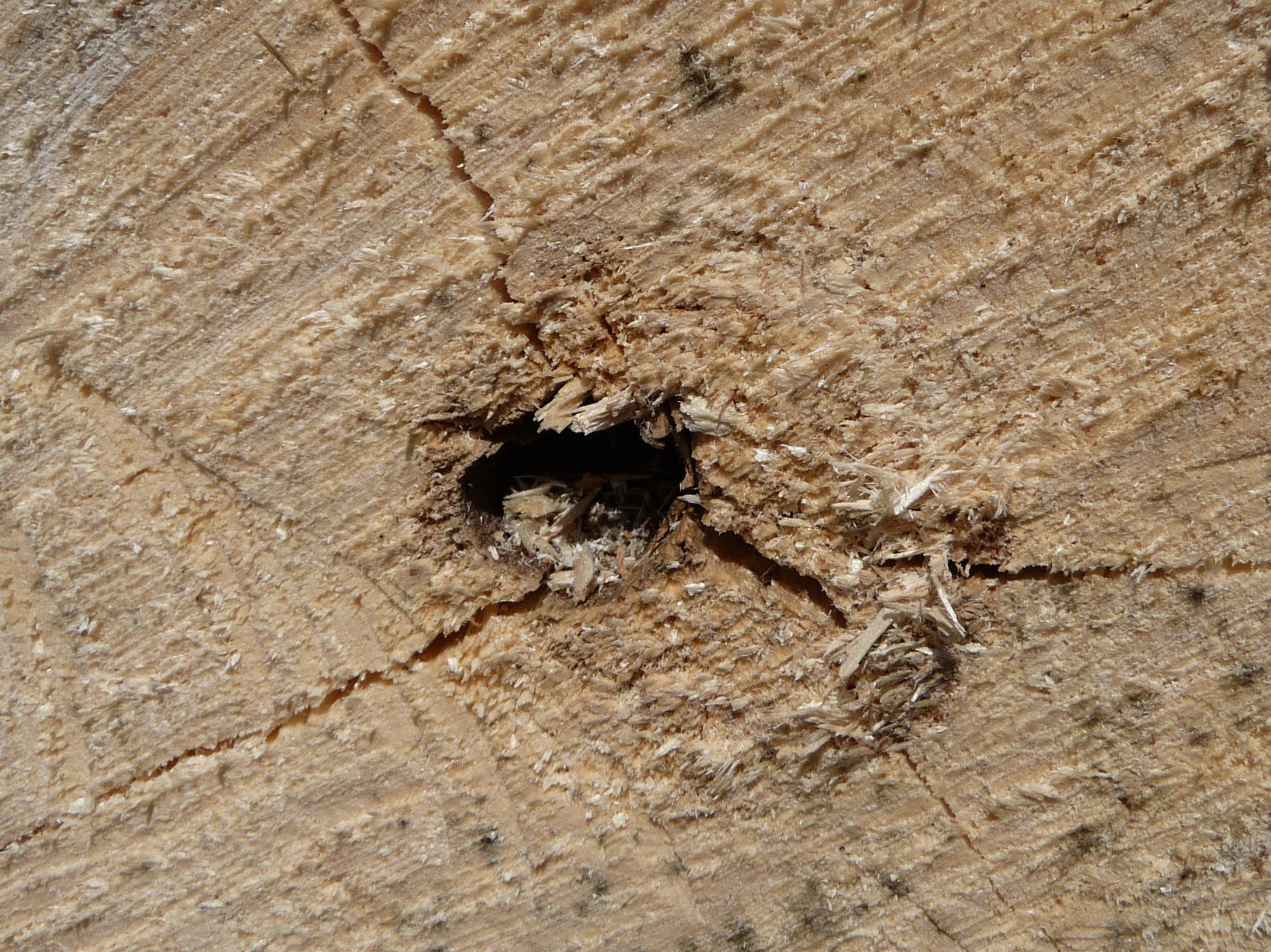 Bohrloch des Großen Pappelbocks (Saperda carcharias) in einer gefällten Zitterpappel (Populus tremula) bei Bärnzell, Gemeinde Zwiesel, Bayerischer Wald